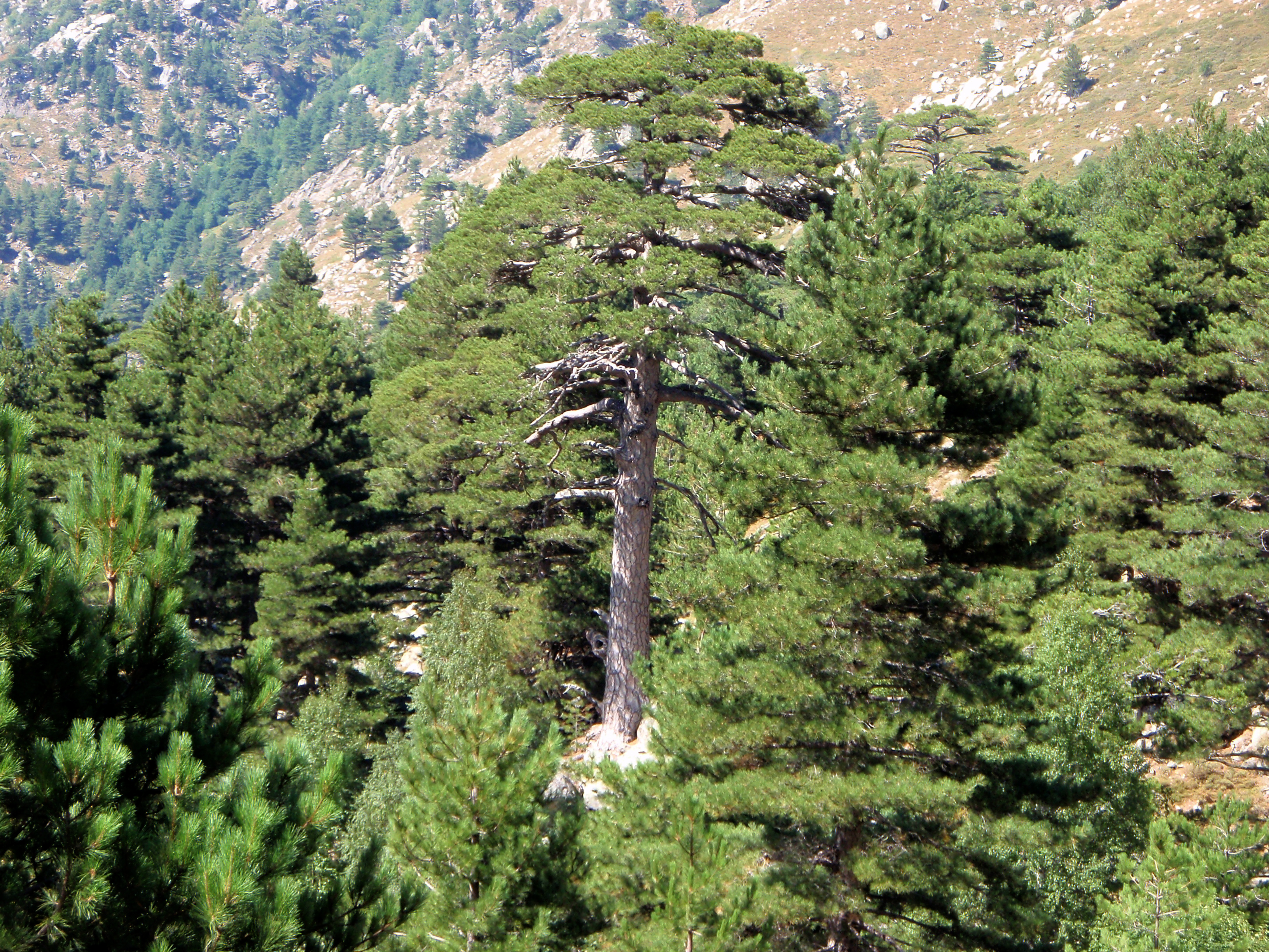 Pinus nigra var. corsicana, Corsica